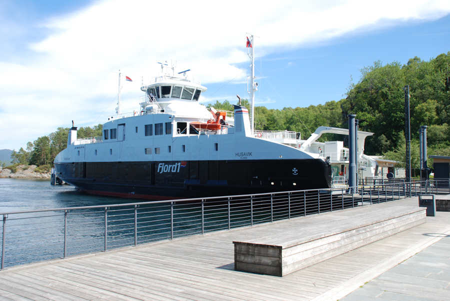 MF «Husavik» ved Sandvikvåg fergekai den 2. juli 2019.